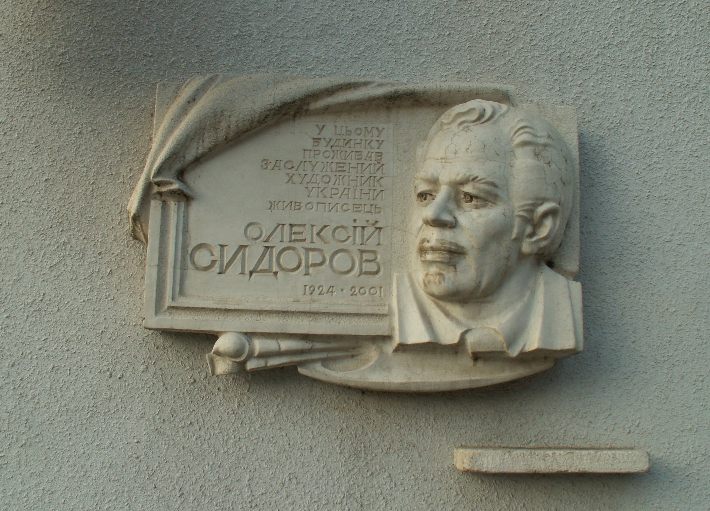 Vinnytsia Artynova Str 38 Sydorov Memorial Plaque